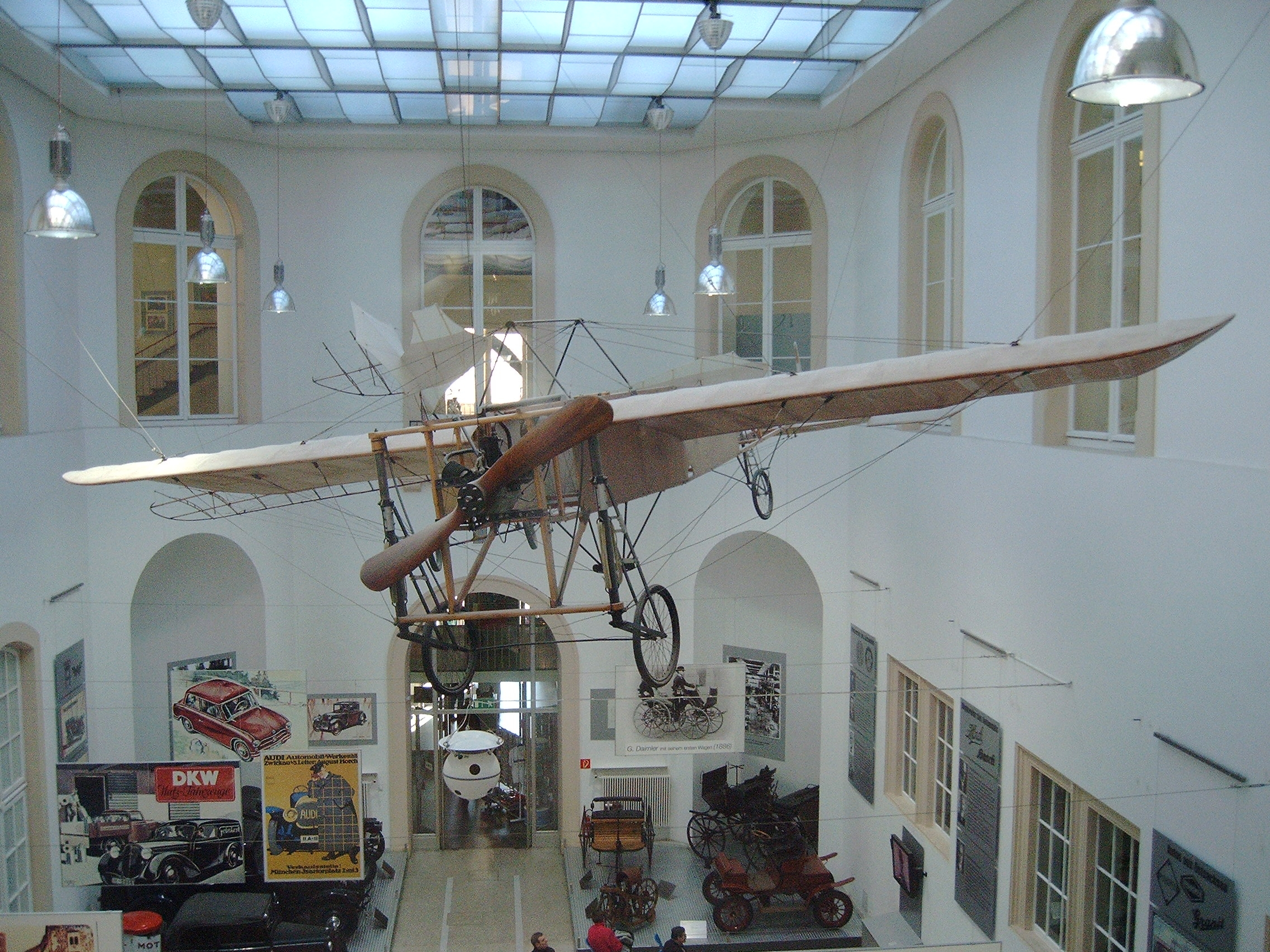 Flugzeug im Verkehrsmuseum Dresden Eigene Aufnahme vom 13.Januar 2005 Schumir GNU FDL